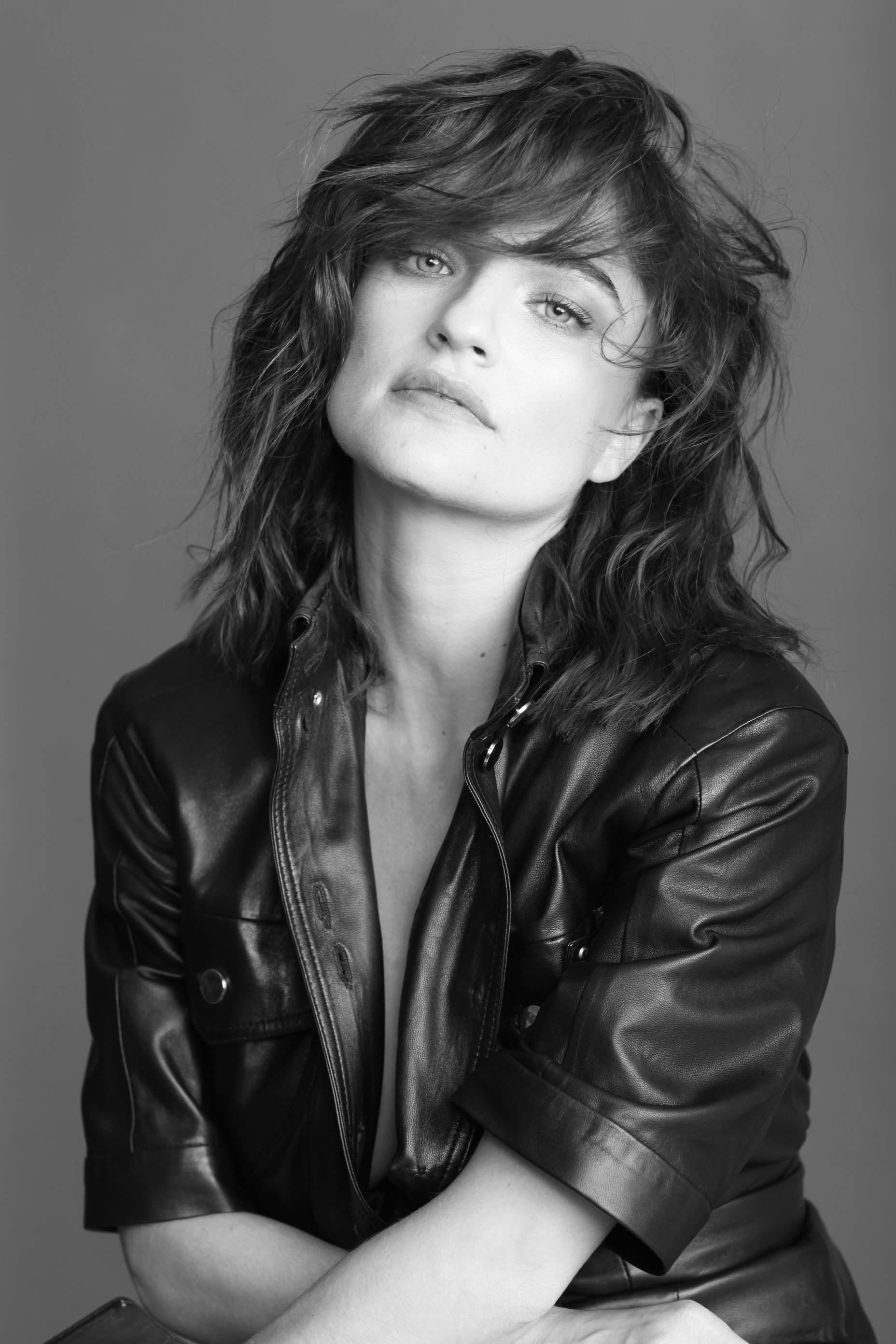 אניה בוקשטיין